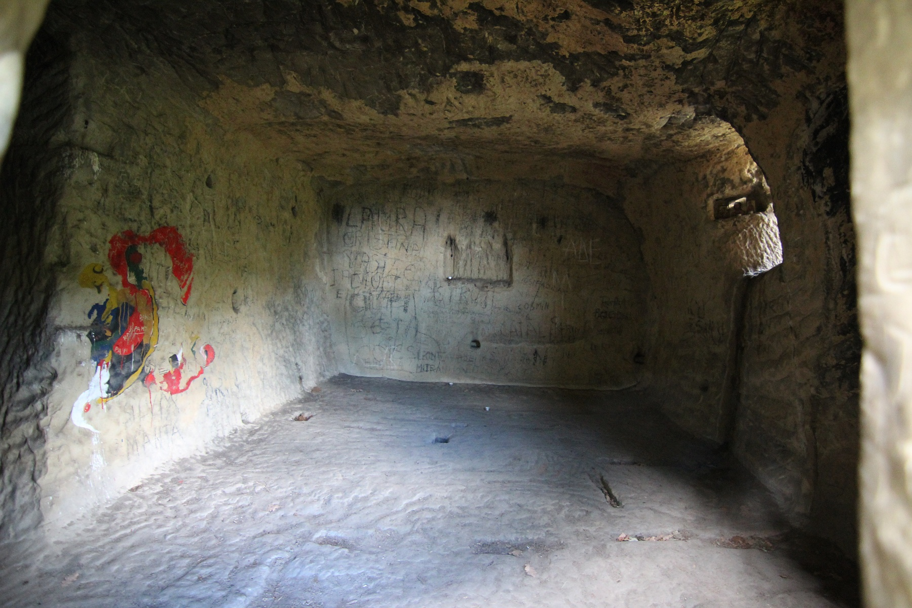 Peștera lui Dionisie, interior 07